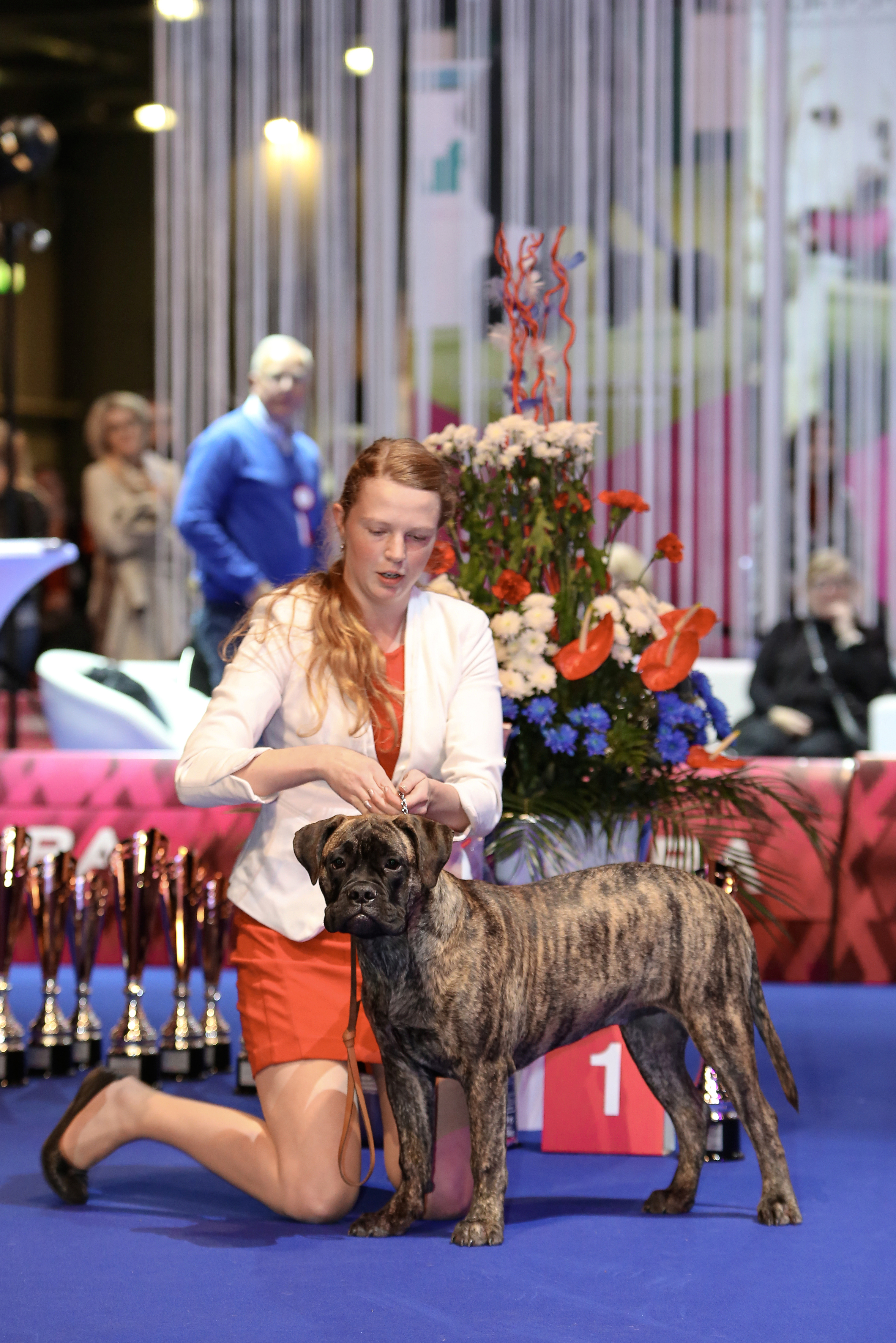 EDS 2014